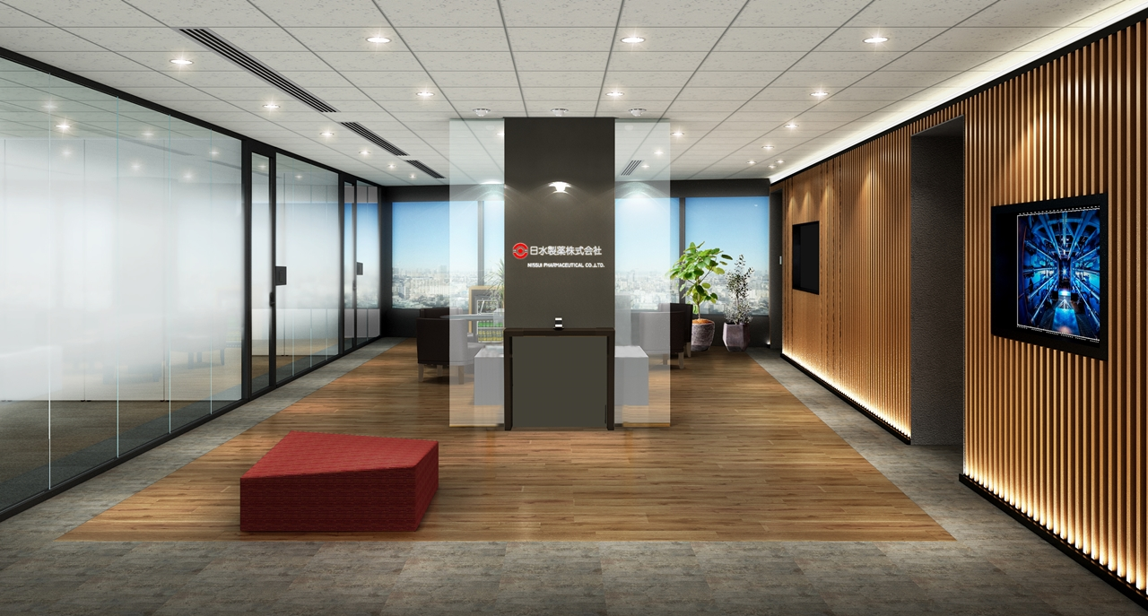 日水製薬株式会社 上野フロンティアタワー